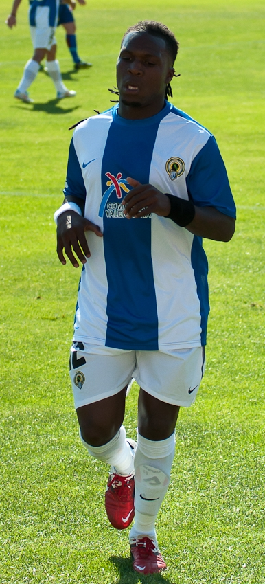 El jugador herculà Royston Drenthe